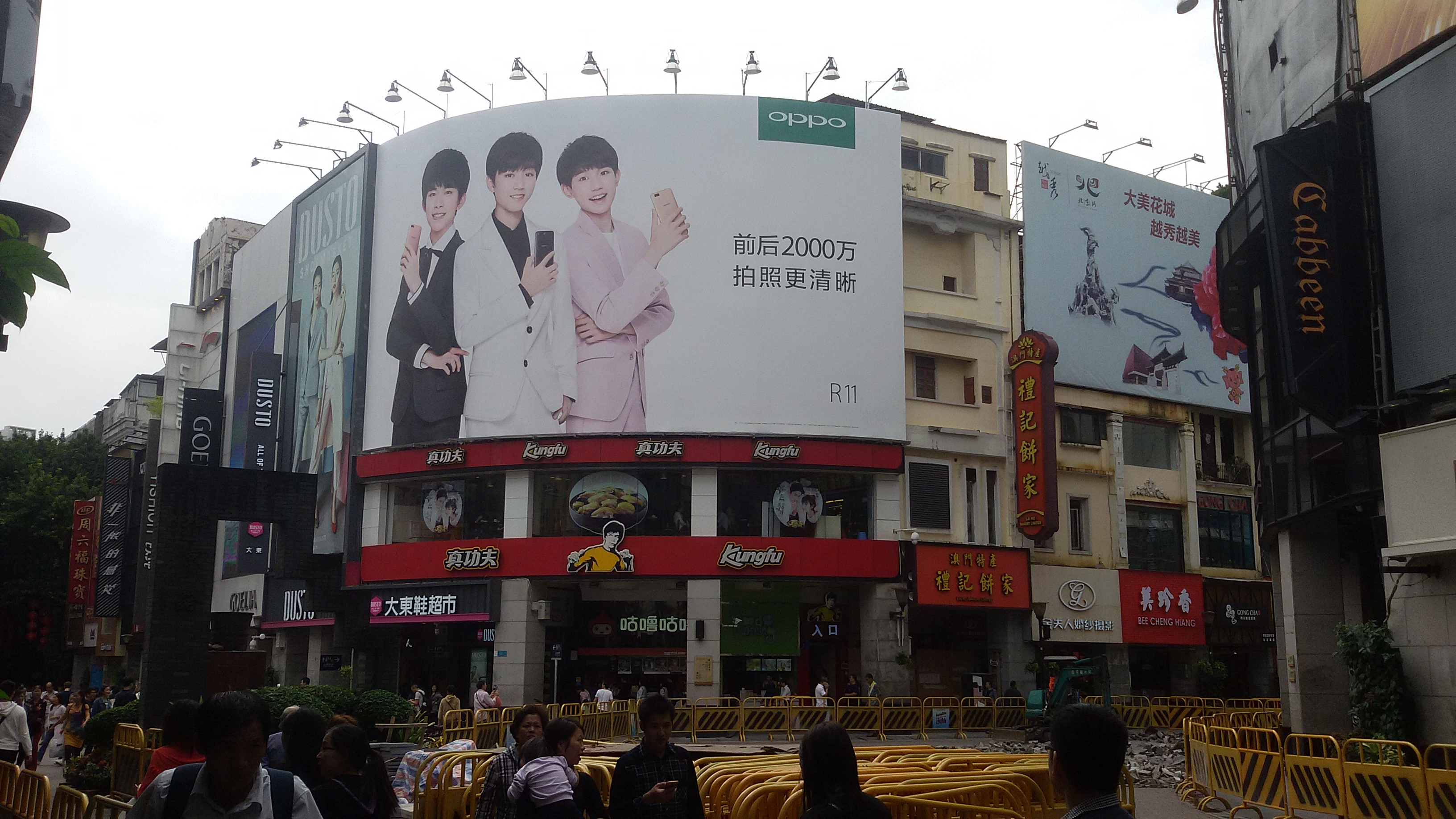 粵語: 越秀區北京路同西湖路嘅交界